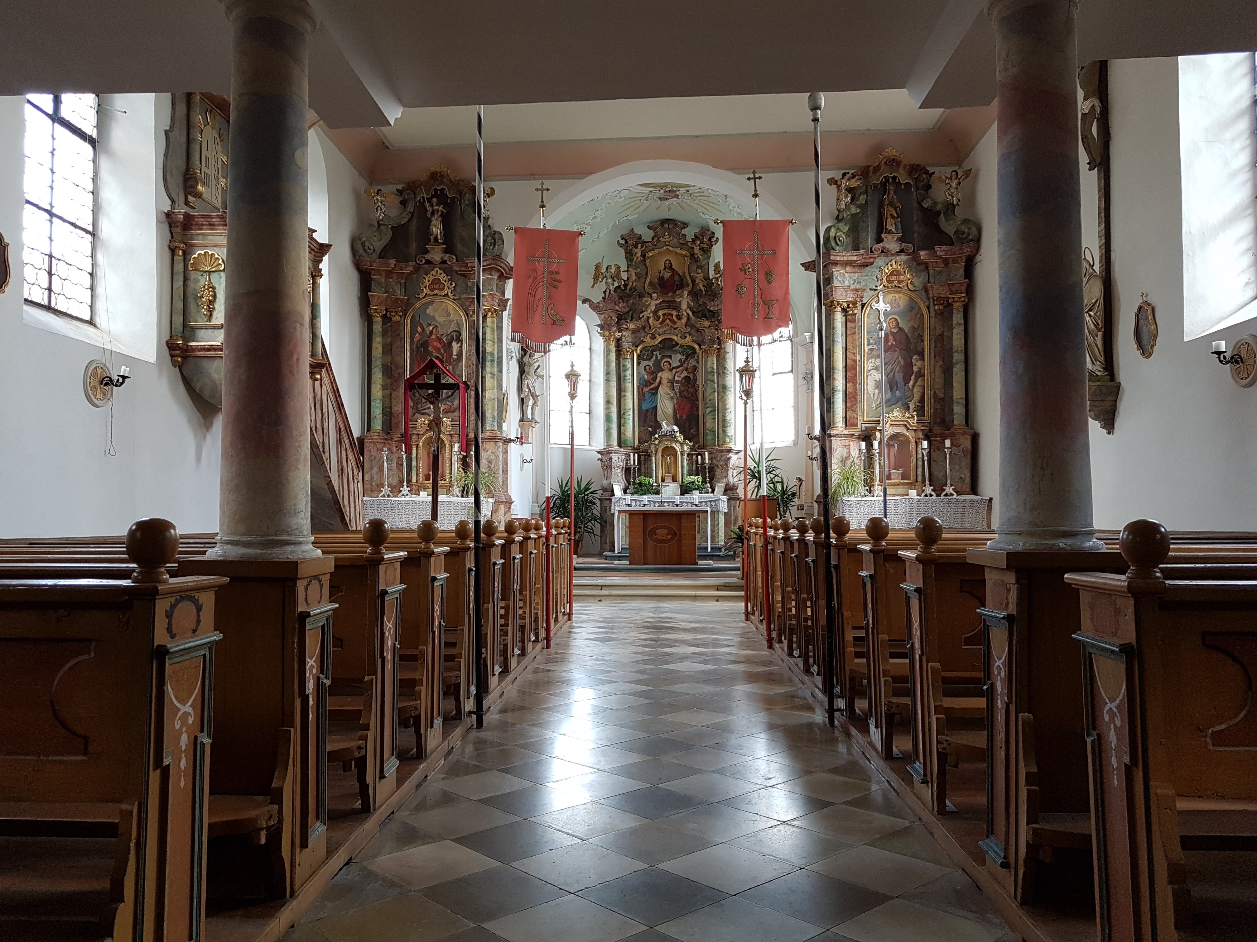 Burk (Marktoberdorf), Kirche St. Sebastian, Innenraum mit Blick zum Chor.